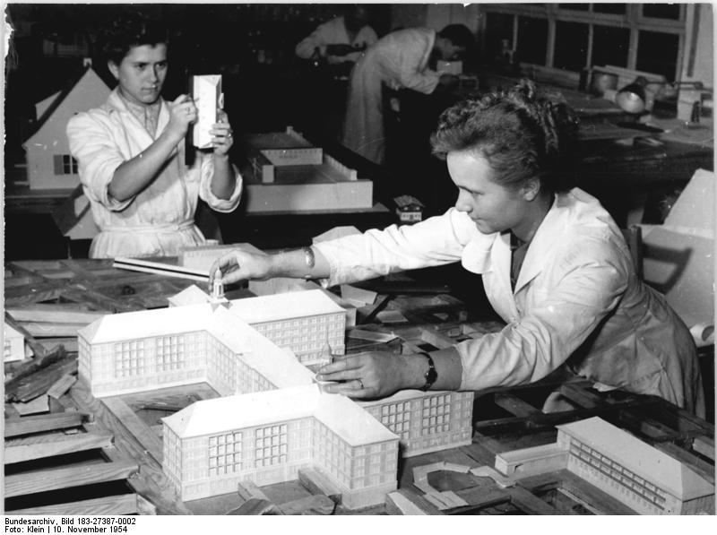 Ministerium für Aufbau, Architekten mit Modellen Zentralbild-Klein 8 Motive 10.11.1954 Tanzpalast aus Hirnholzklötzen, Leim und Gips. Aus der Arbeit der Architektur-Werkstätten des Ministeriums für Aufbau (Modellwerkstatt) Am Hackeschen Markt in Berlin arbeiten erfahrene Architektur-Modellbauer und Bildhauer mit leichten, gewandten Händen an Modellen für neue Bauten in Berlin und der DDR. Die Hauptaufgabe der Werkstatt liegt auf dem Gebiet des Städtebaus. Konstruktive Mängel an Bauwerken, fehlende Harmonie im Gesamtbild können durch die Modellbauten schnell erkannt und verändert werden. Die Modelle werden maßstäblich nach den Originalbauplänen hergestellt. UBz: Es ist für die Architektur-Modellbauerin Zurkof keine besonders anstrengende Arbeit, ganz allein einen Dachreiter auf das Großkrankenhaus in Saalfeld zu setzen. Dieses Modell ist aus Pappe farbig gestaltet und soll den Technikern und Architekten auf der Baustelle in Saalfeld die Arbeit erleichtern.